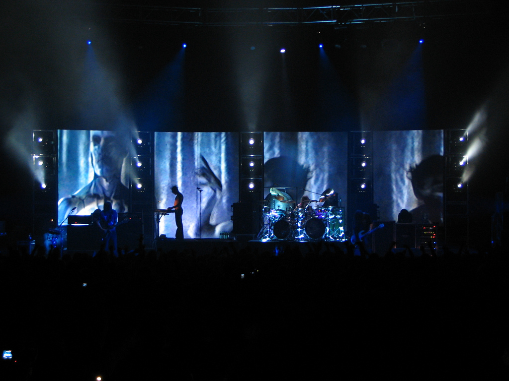 video de schism en vivo